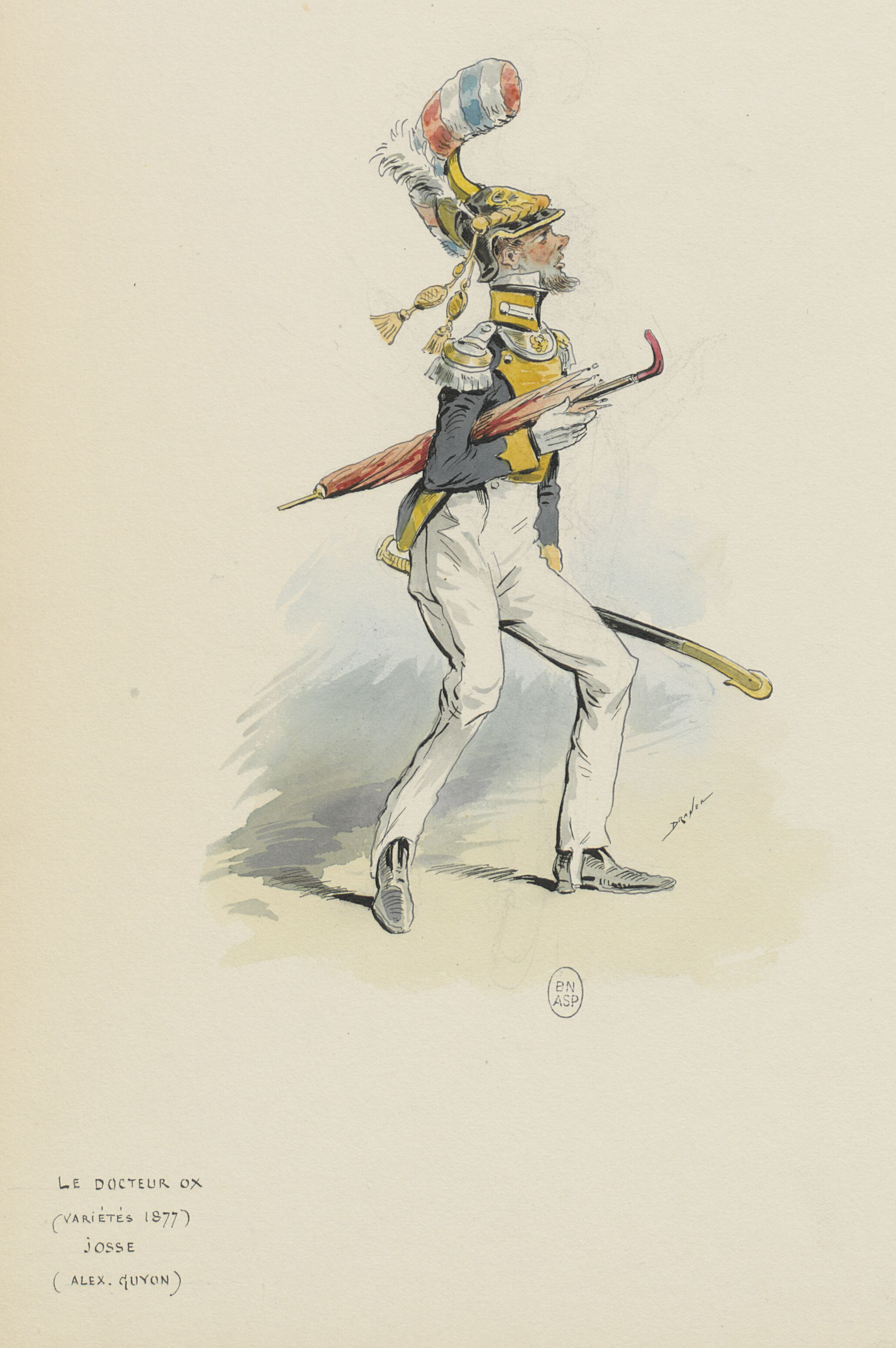 Le docteur Ox, opéra-bouffe de Gille, Mortier, Offenbach : Alex. Guyon dans le rôle de Josse : dessin de Draner